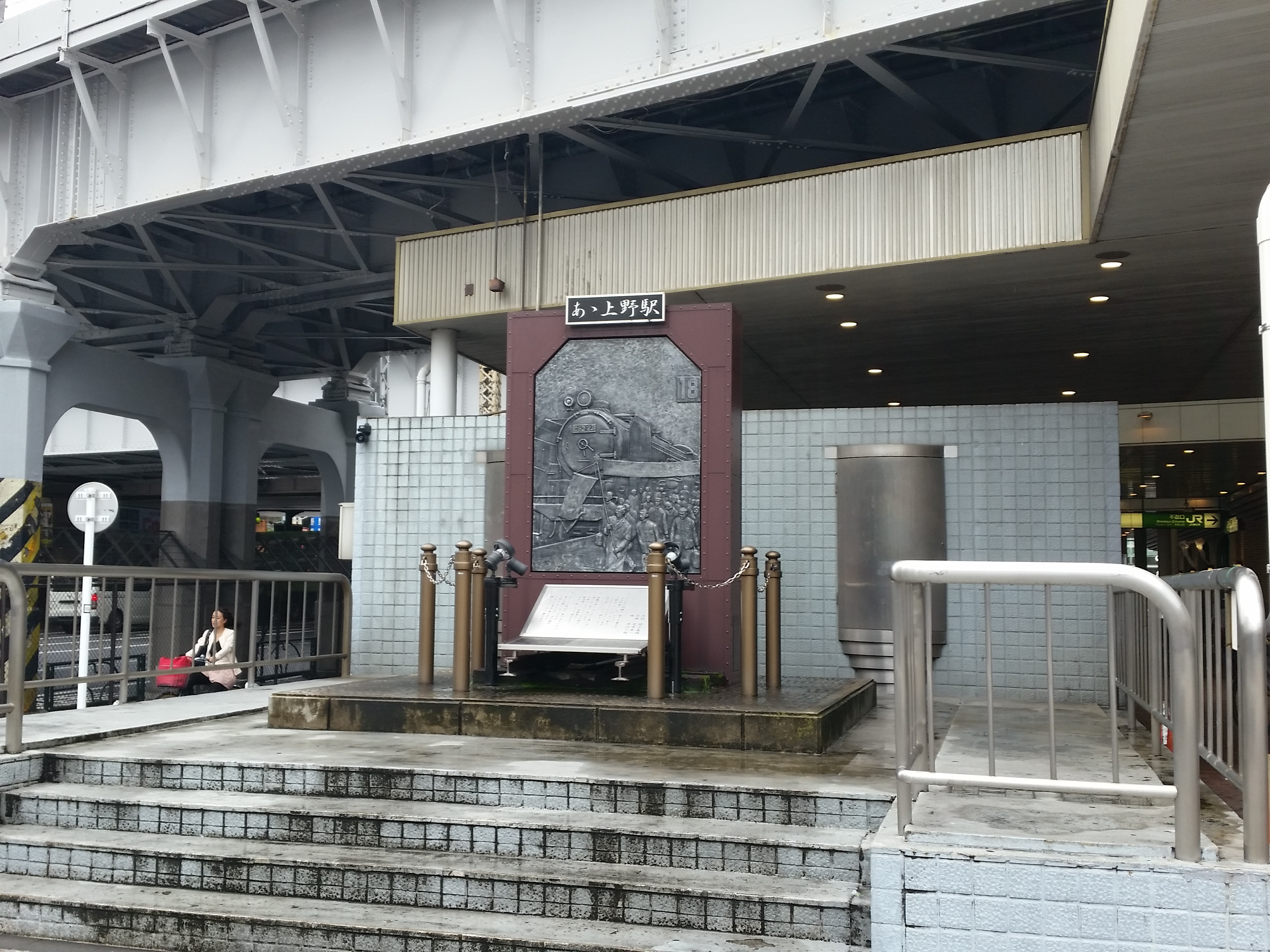 せっかく上野から出たので今日のポータル撮っといた。 羽生にも碑が建ってます。 あゝ上野駅